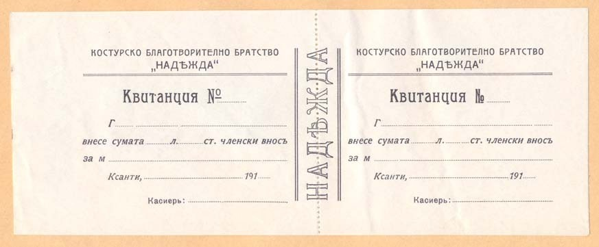 Разписка на Костурското македонско братство Надежда